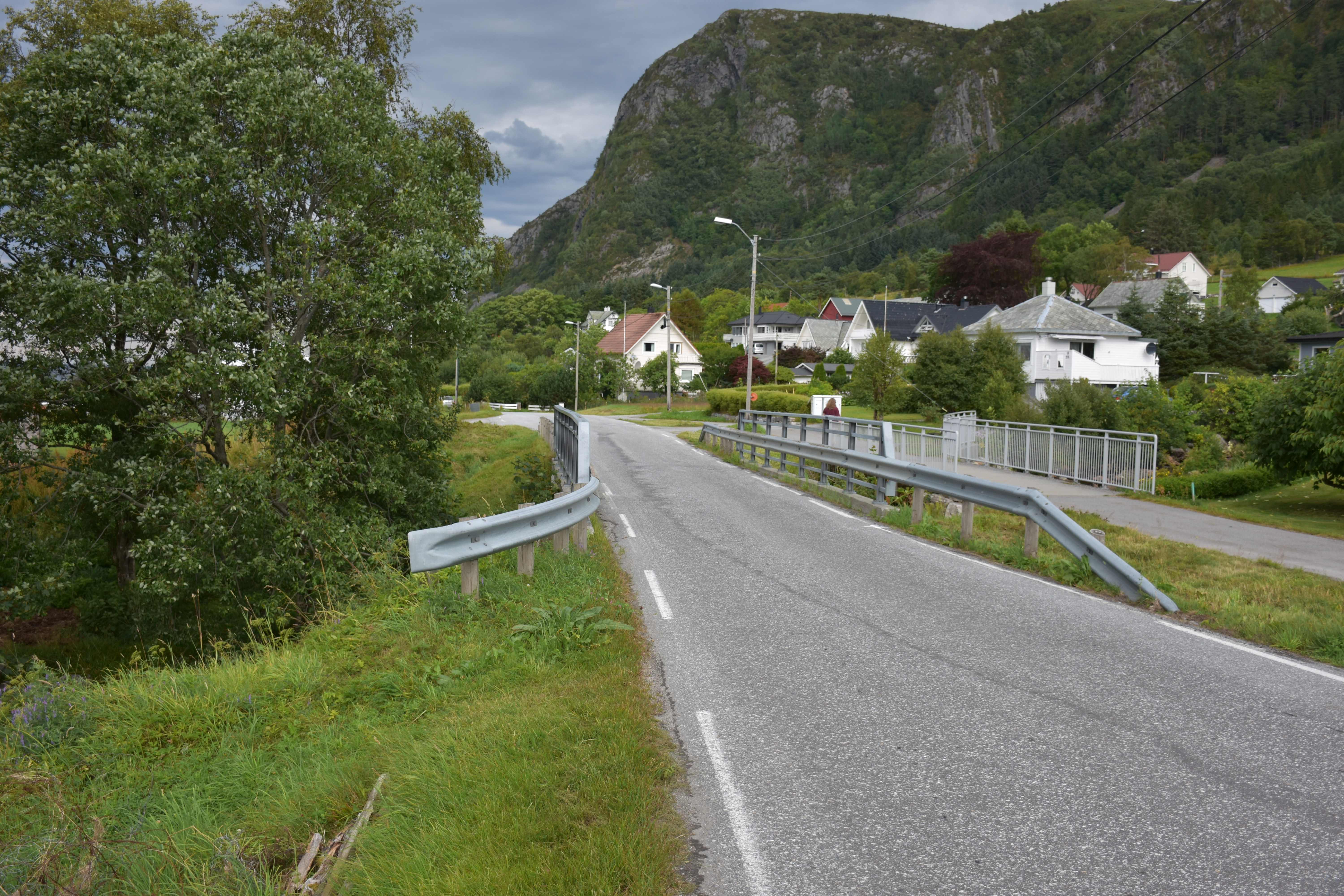 Fløvegen (fylkesvei 25) forbi Ulstein gamle kirkested